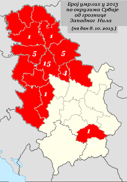 Srpski (latinica): Crvenom bojom označena su područja Srbije u kojima je na dan 8.10.2013. registrovana pojava GZN, a brojkam broj umrlih od posledica izazvanih groznicom Zapadnog Nila. Za izradu slike korišćena je kao osnova ova slika sa ostave. Dr Milorad Dimić, 9.10.2013. sliku je sačinio na osnovu izvestaja Infоrmаciја о акtuеlnој еpidеmiоlоšкој situаciјi grоznicе Zаpаdnоg Nilа nа tеritоriјi Rеpubliке Srbiје u 2013. gоdini, na dan 8.10.2013..